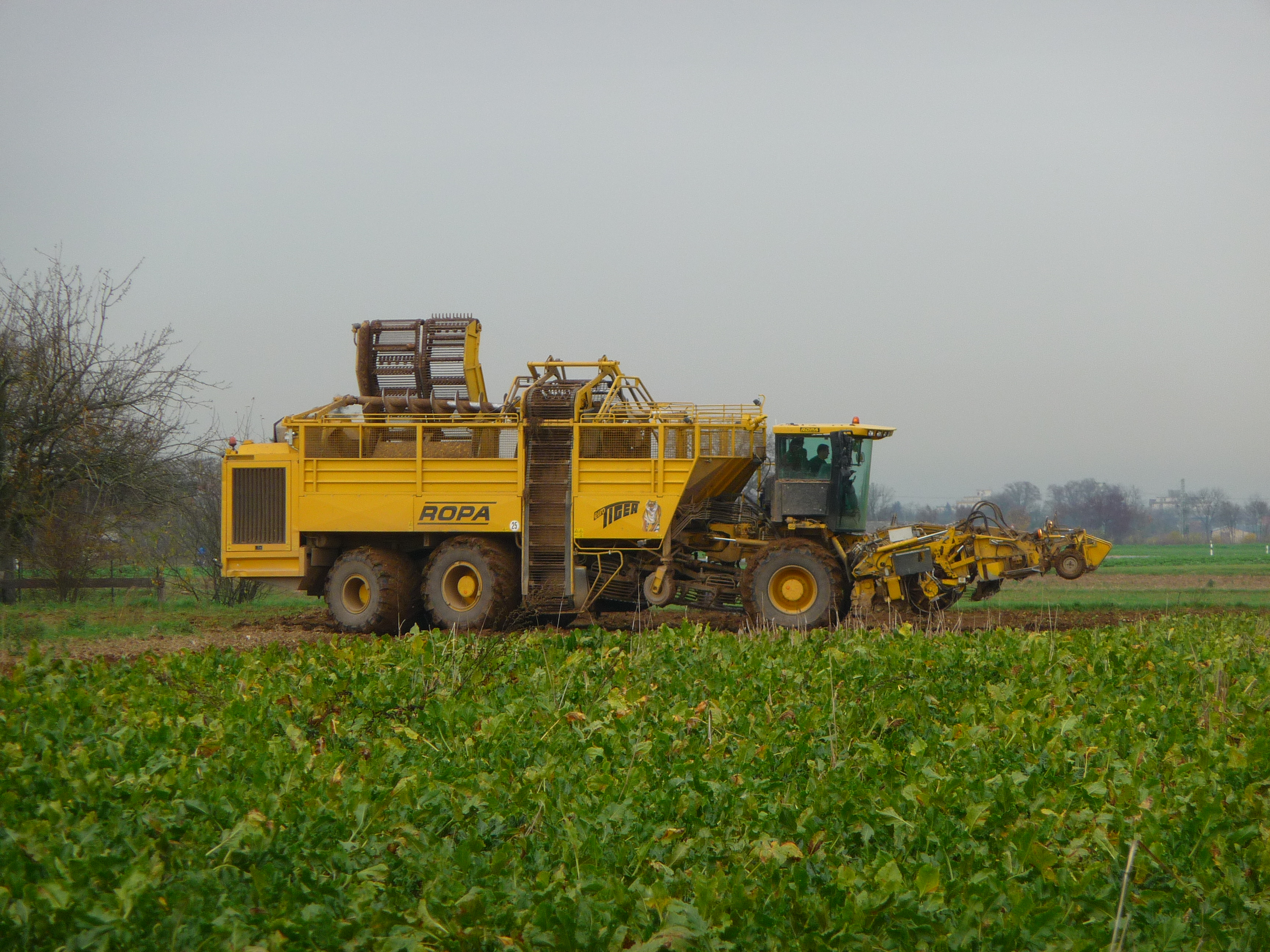 Zuckerrübenvollernter ROPA euro-tiger V8-3, aufgenommen im Rhein-Neckar-Kreis (Baden-Württemberg, Deutschland); DaimlerChrysler V8 Dieselmotor mit 436kw (604 PS), Länge 14,95 m, Höhe 4 m, Leistungskapazität bis 2ha/Stunde, Bunker mit 40 m³ Ladevolumen, Entladung binnen 60 Sekunden